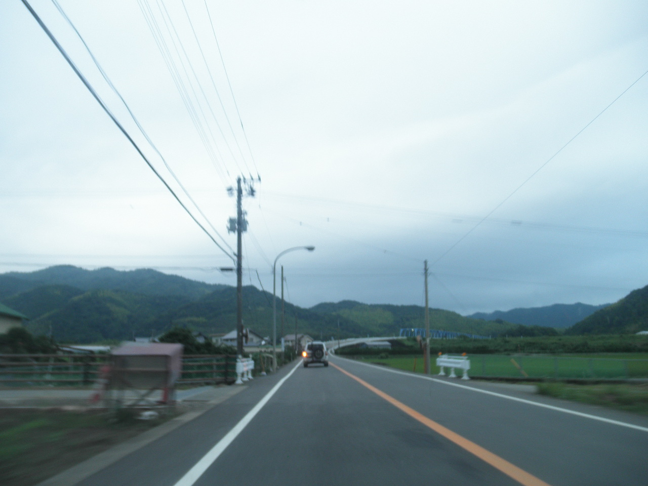 徳島県阿南市上大野町住吉 徳島県道22号阿南勝浦線